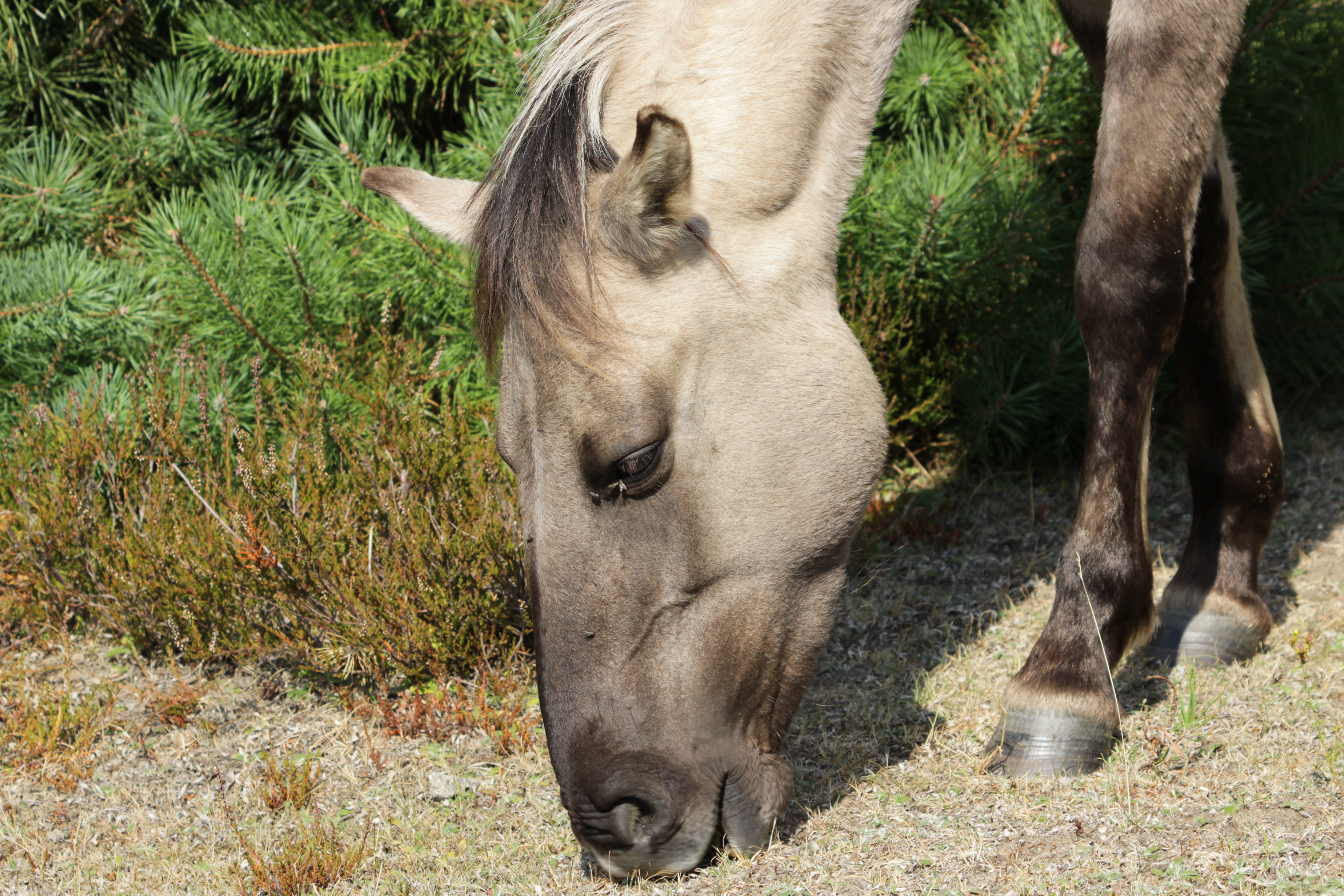 Konik